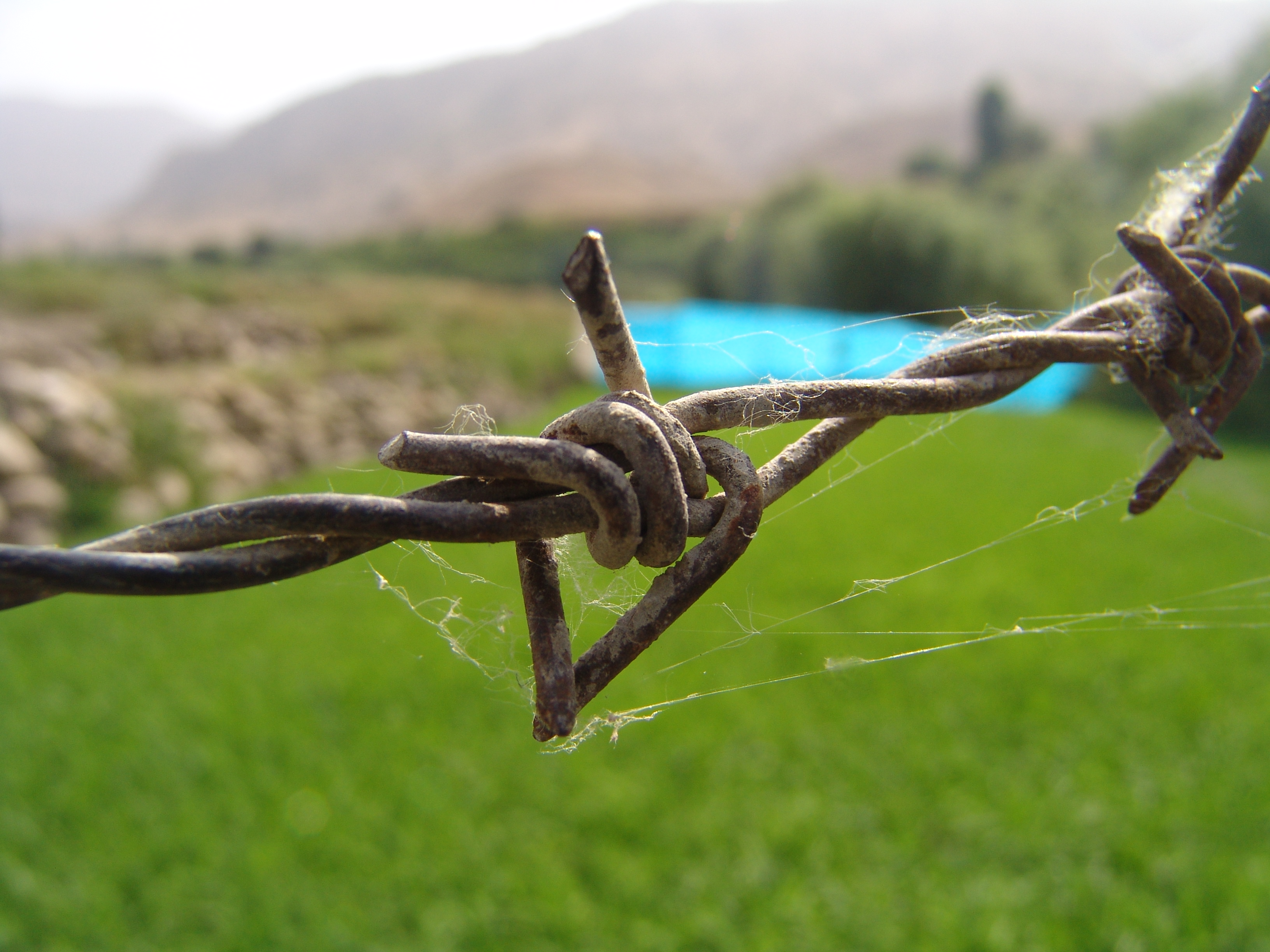 جهنم سبز! کاربرد سیم‌خاردار در کشاورزی